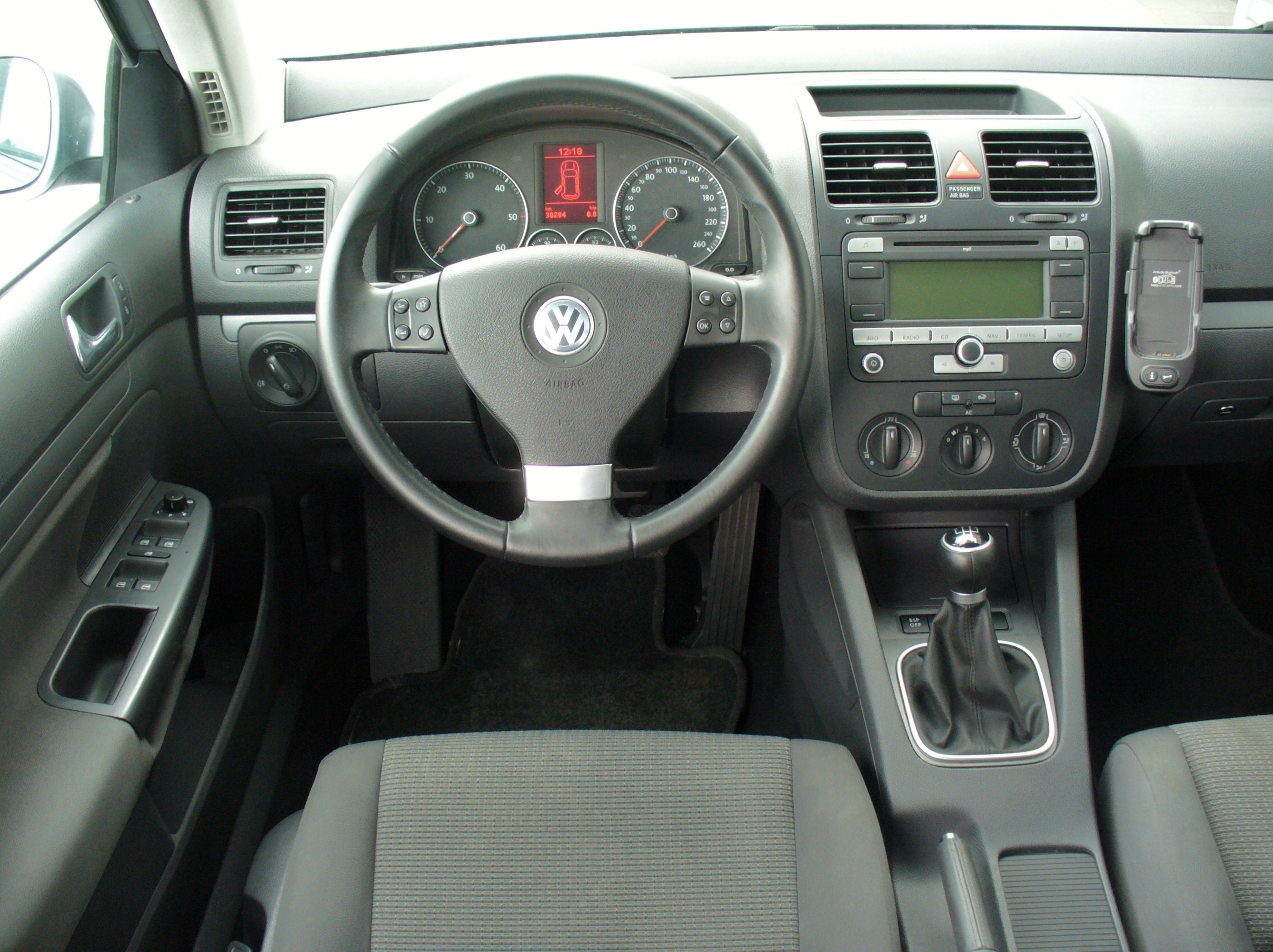 VW Golf V Variant